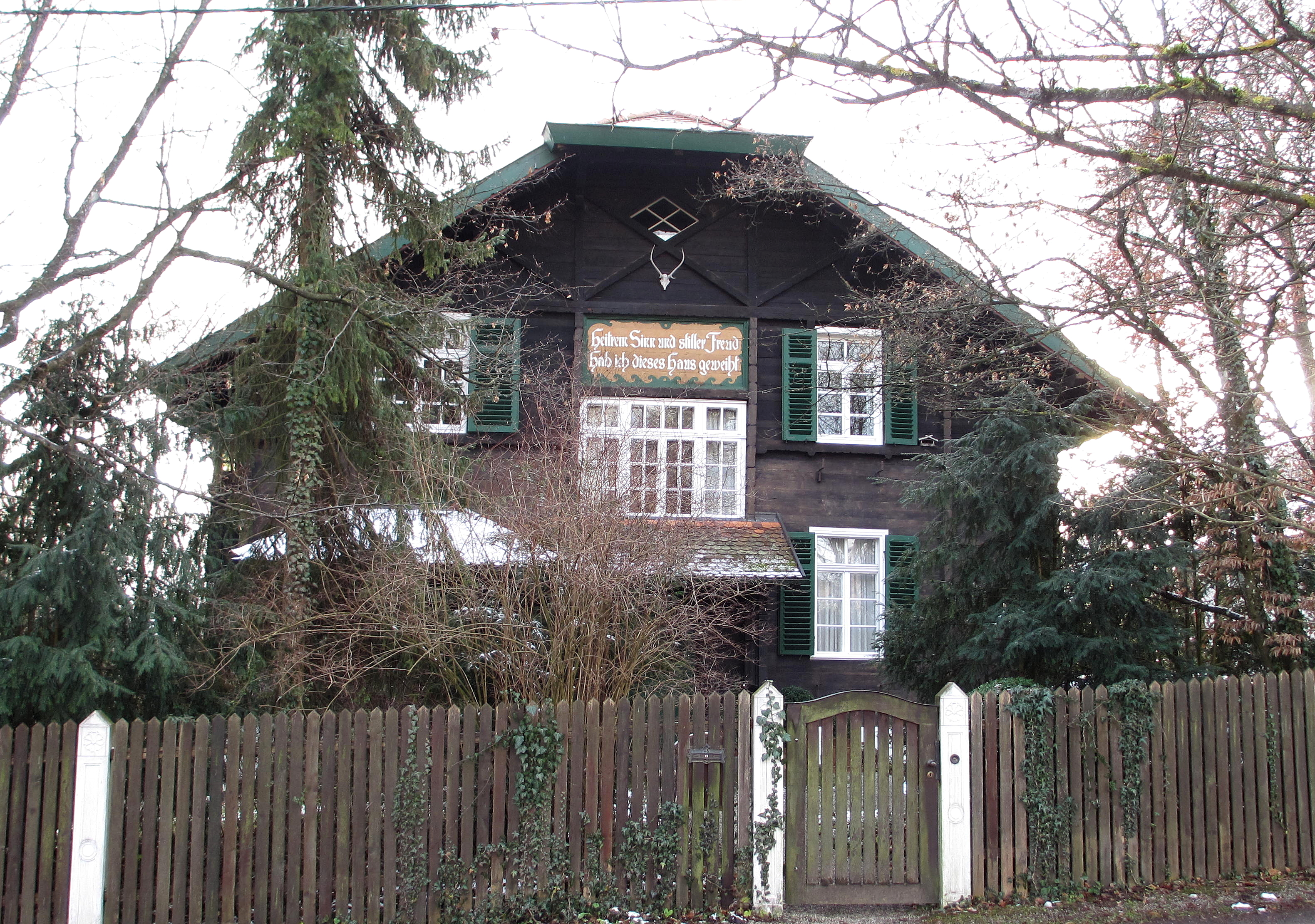 Starnberg, OT Söcking, Prinz-Karl-Straße 38. Das Landhaus, ein zum Teil verschindelter und bemalter Schopfwalmdachbau, ließen der Münchner Architekt Eugen Behles und seine Frau Helene 1902 für sich selbst erbauen. Das Gebäude ist den Blockhäusern Vorarlbergs nachempfunden und auch von Vorarlberger Zimmerleuten errichtet worden.[1] This is a photograph of an architectural monument.